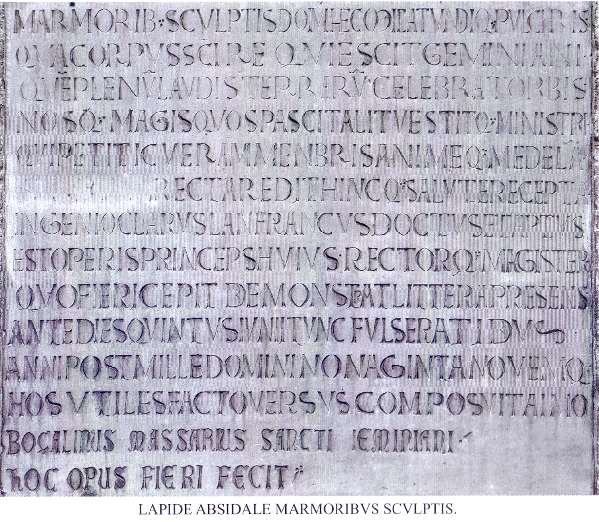 Lapide di fondazione murata sull'abside maggiore del Duomo di Modena.